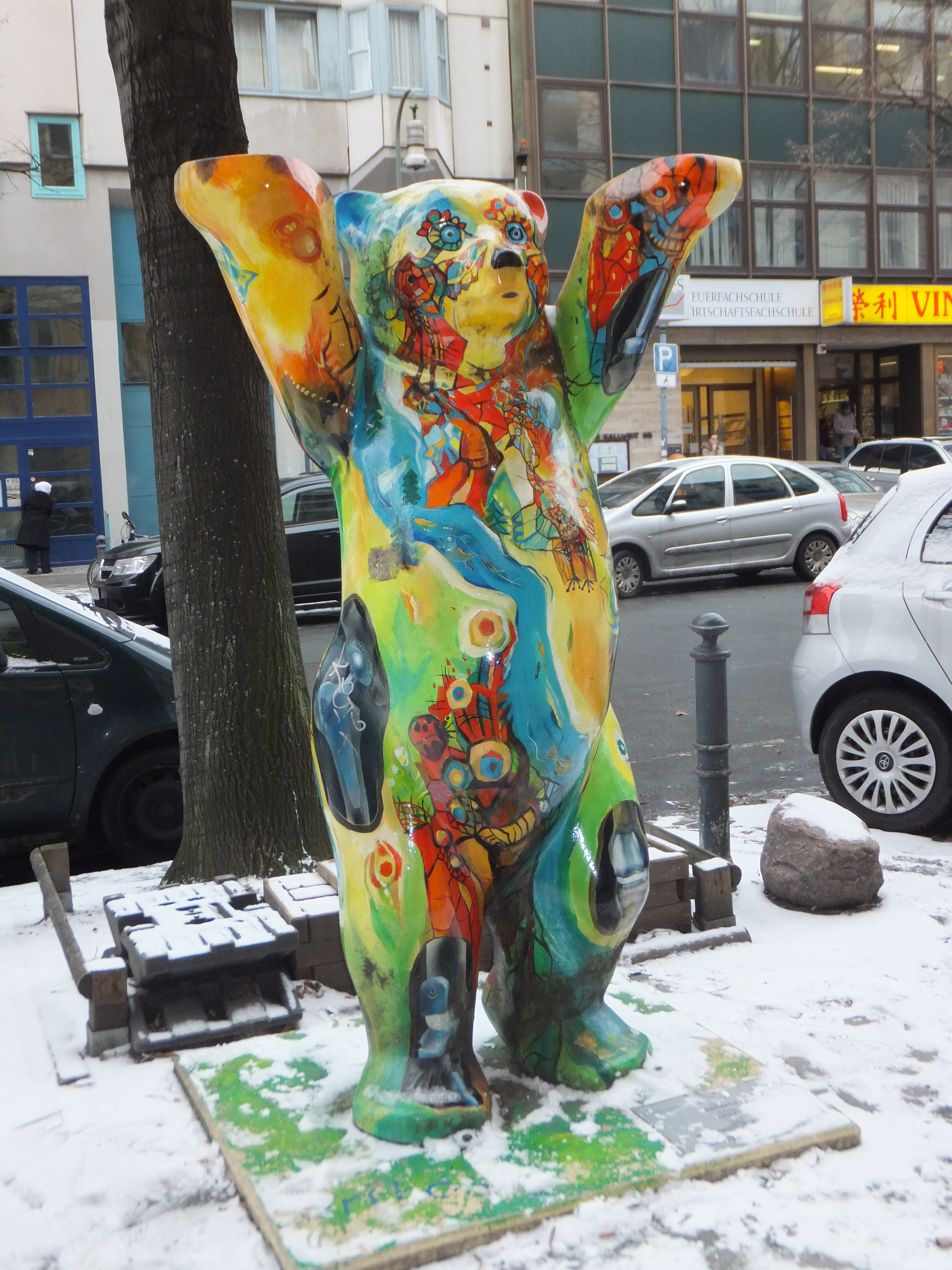 Buddy Bear am Wittenbergplatzin Berlin-Schöneberg